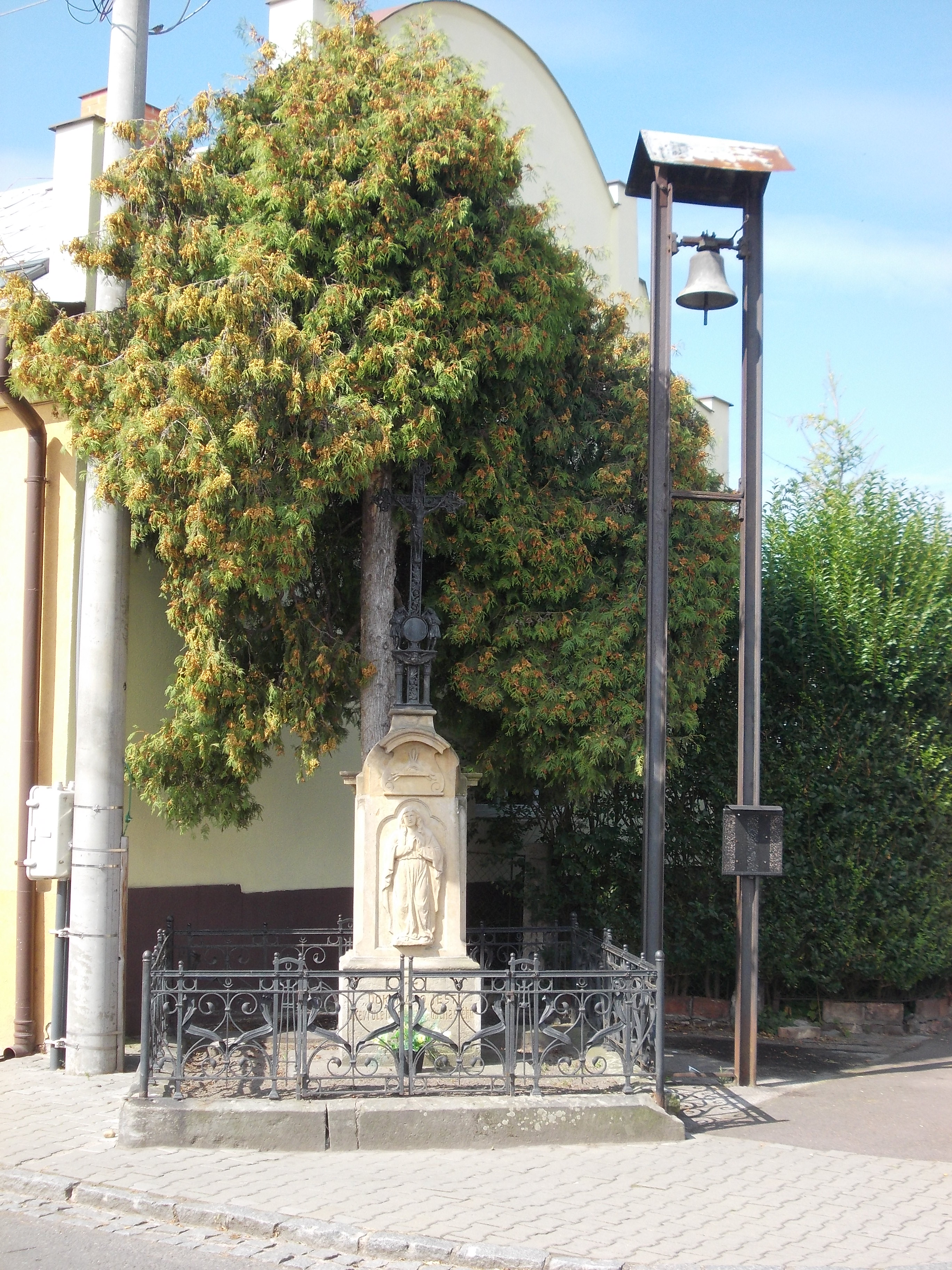 Nové Jesenčany - krucifix a zvonička